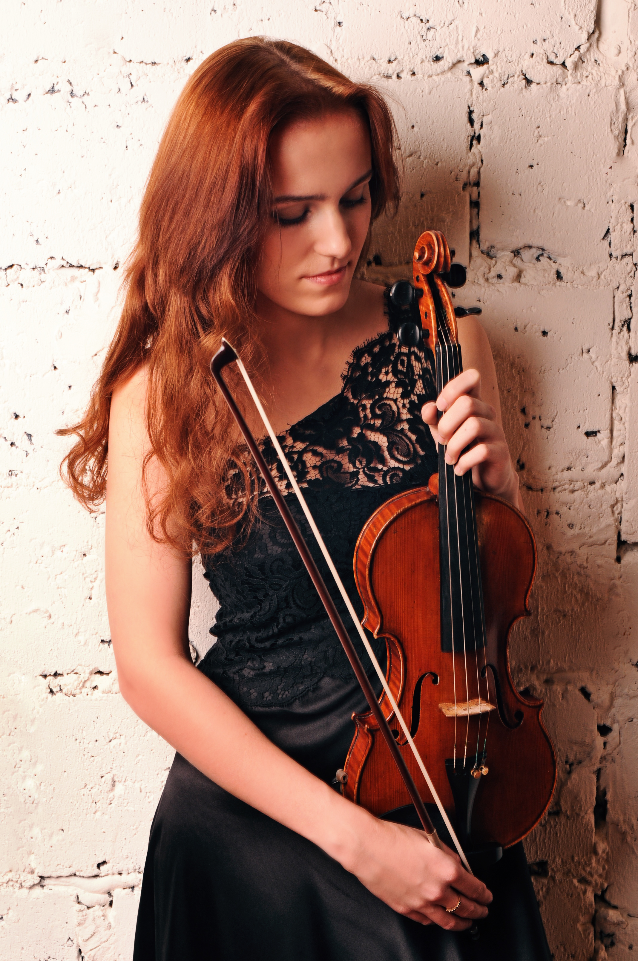 Марианна Васильева